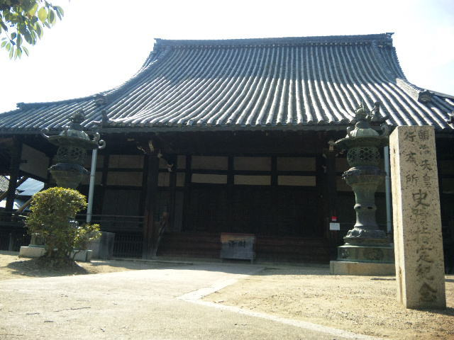 称念寺(橿原市)本堂